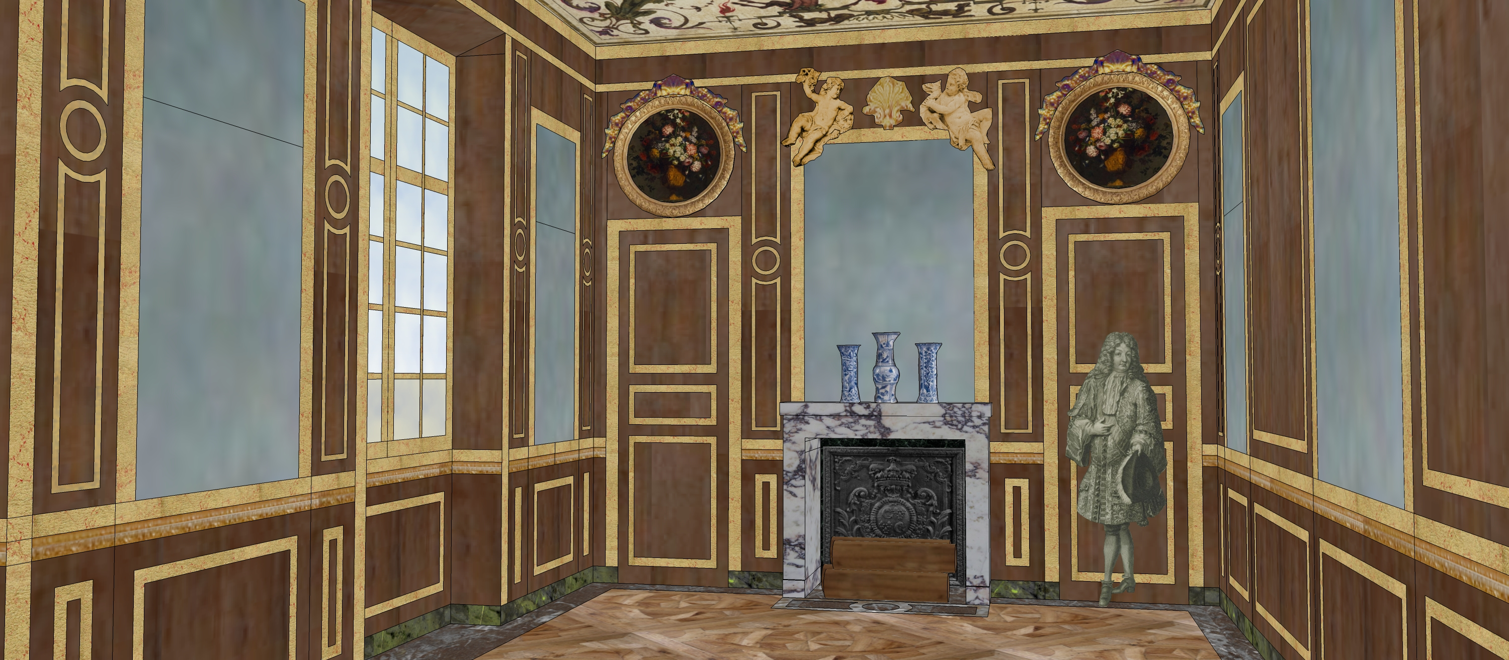 Essai de restitution de la chambre de Monseigneur au sein du Petit Appartement Frais de l'aile des marronniers, vers 1703.